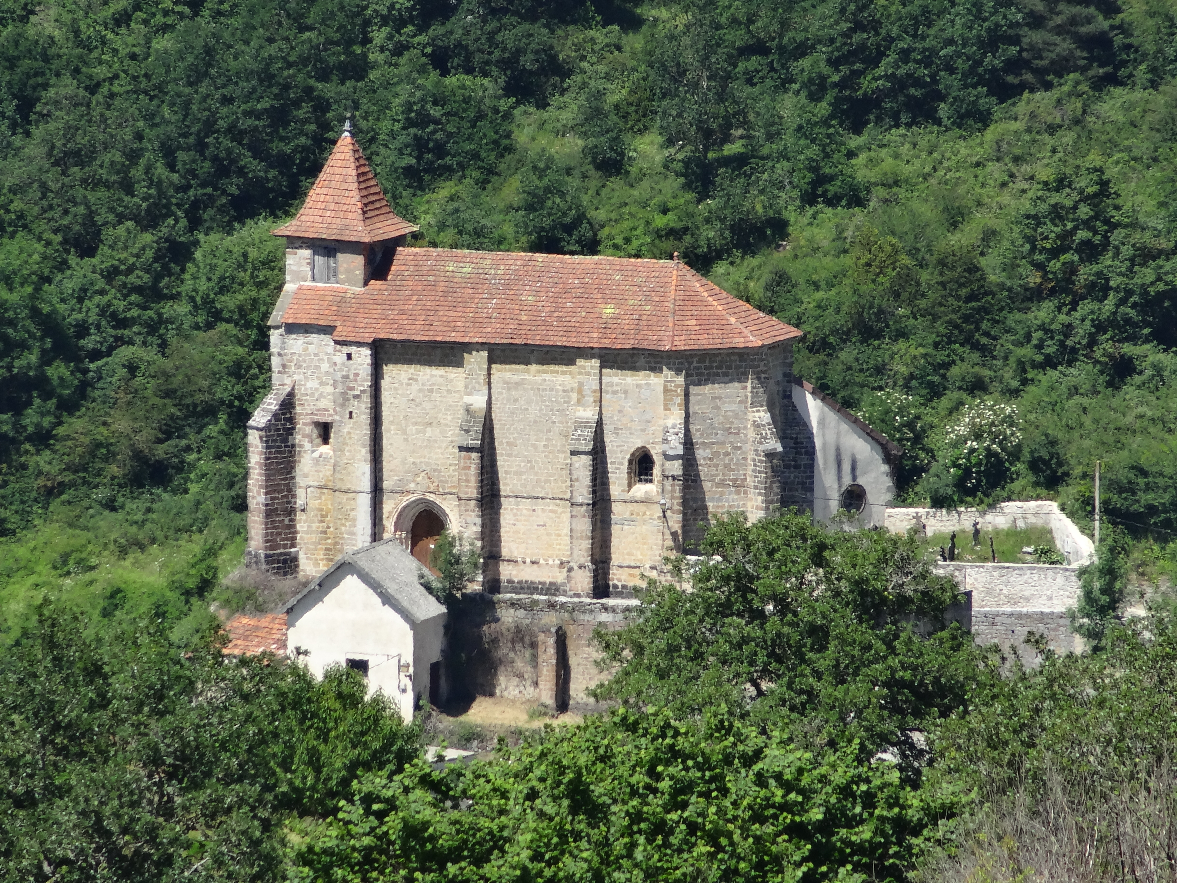 Abaurrepea church